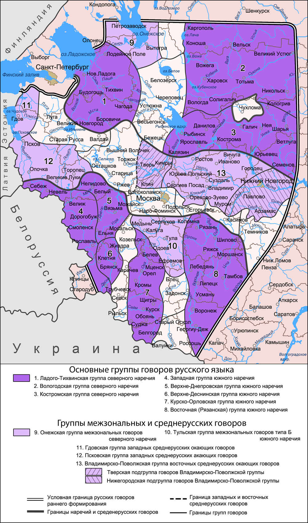 Карта групп говоров русского языка на территории распространения говоров раннего формирования (основные группы говоров в пределах наречий и группы говоров в пределах переходных (межзональных) ареалов наречий и среднерусских говоров).. Источники: Захарова К. Ф., Орлова В. Г. Диалектное членение русского языка — 2-е изд. — М.: Едиториал УРСС, 2004. — ISBN 5-354-00917-0, Диалектологическая карта русского языка (1964 г.). Касаткин Л. Л. Русские диалекты. Лингвистическая география // Русские. Монография Института этнологии и антропологии РАН. — М.: Наука, 1999. — С. 93—94. Федеральная целевая программа Русский язык. Региональный центр НИТ ПетрГУ